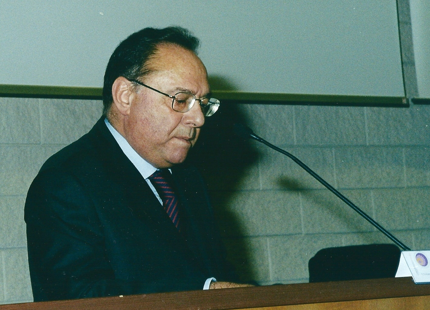 Mauro Di Giandomenico, conferenza